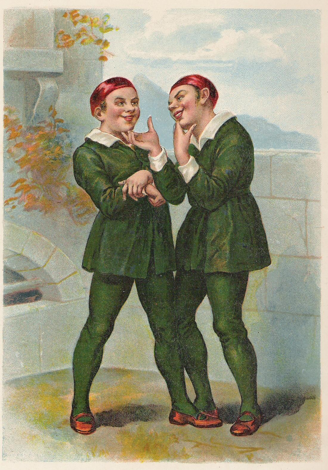 Frontispiece